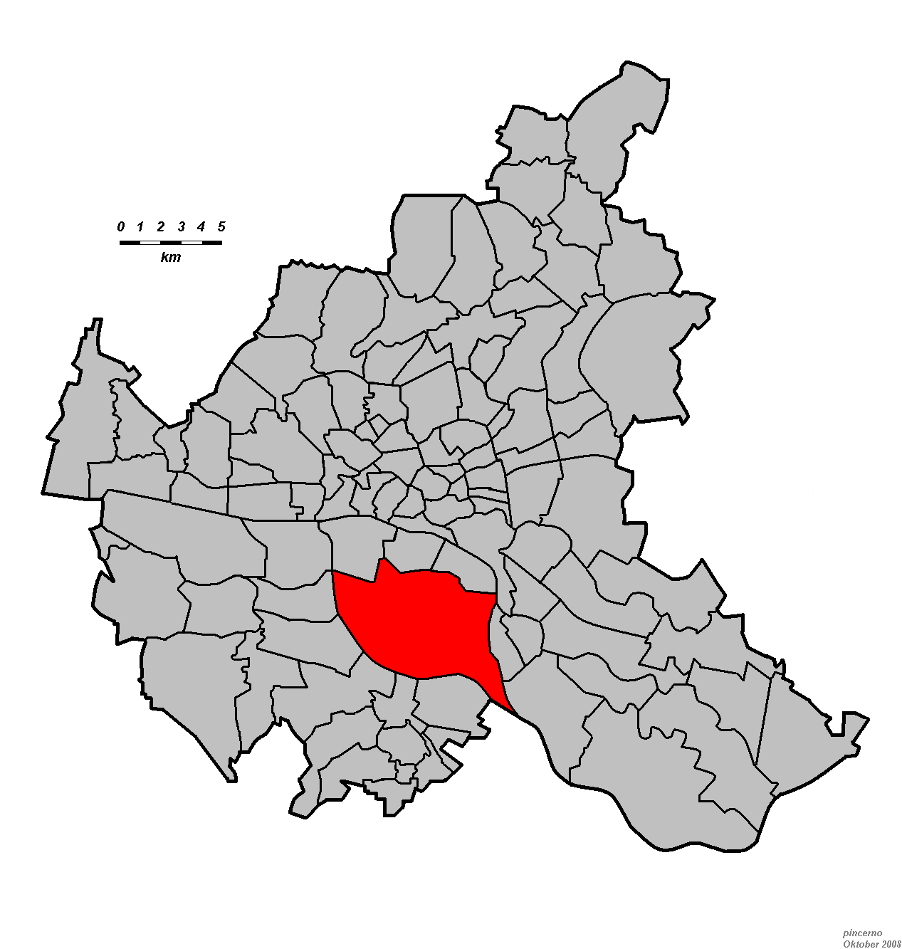 Hamburg: Stadtteil Hamburg-Wilhelmsburg